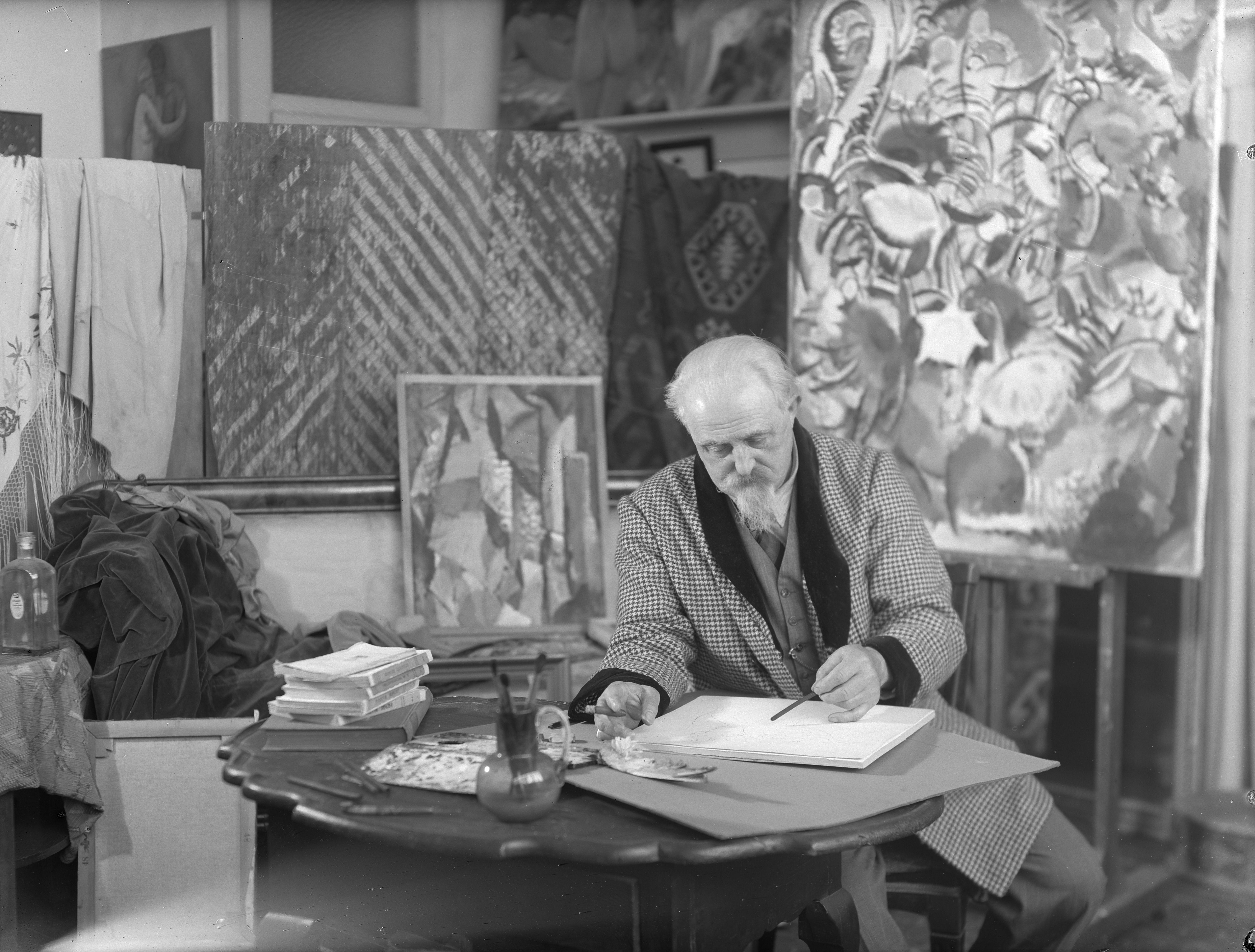 Beschrijving Portret van Jan Sluijters (1881-1957) Kunstschilder, geportretteerd in zijn atelier. Documenttype foto Vervaardiger Merkelbach, Atelier J. Collectie Collectie Atelier J. Merkelbach Geportretteerde Sluijters, J.C.B. (Jan; 1881-1957) Inventarissen Afbeeldingsbestand 010164033164 Generated with Dememorixer